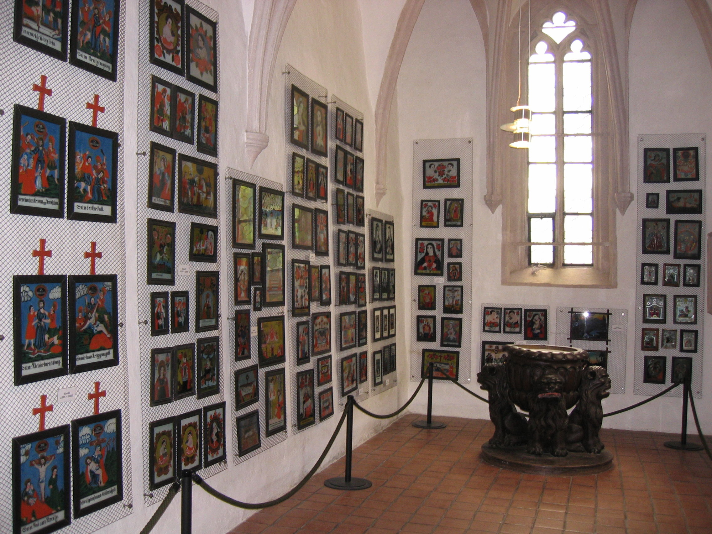 Hinterglasbilder - Museumsbestand